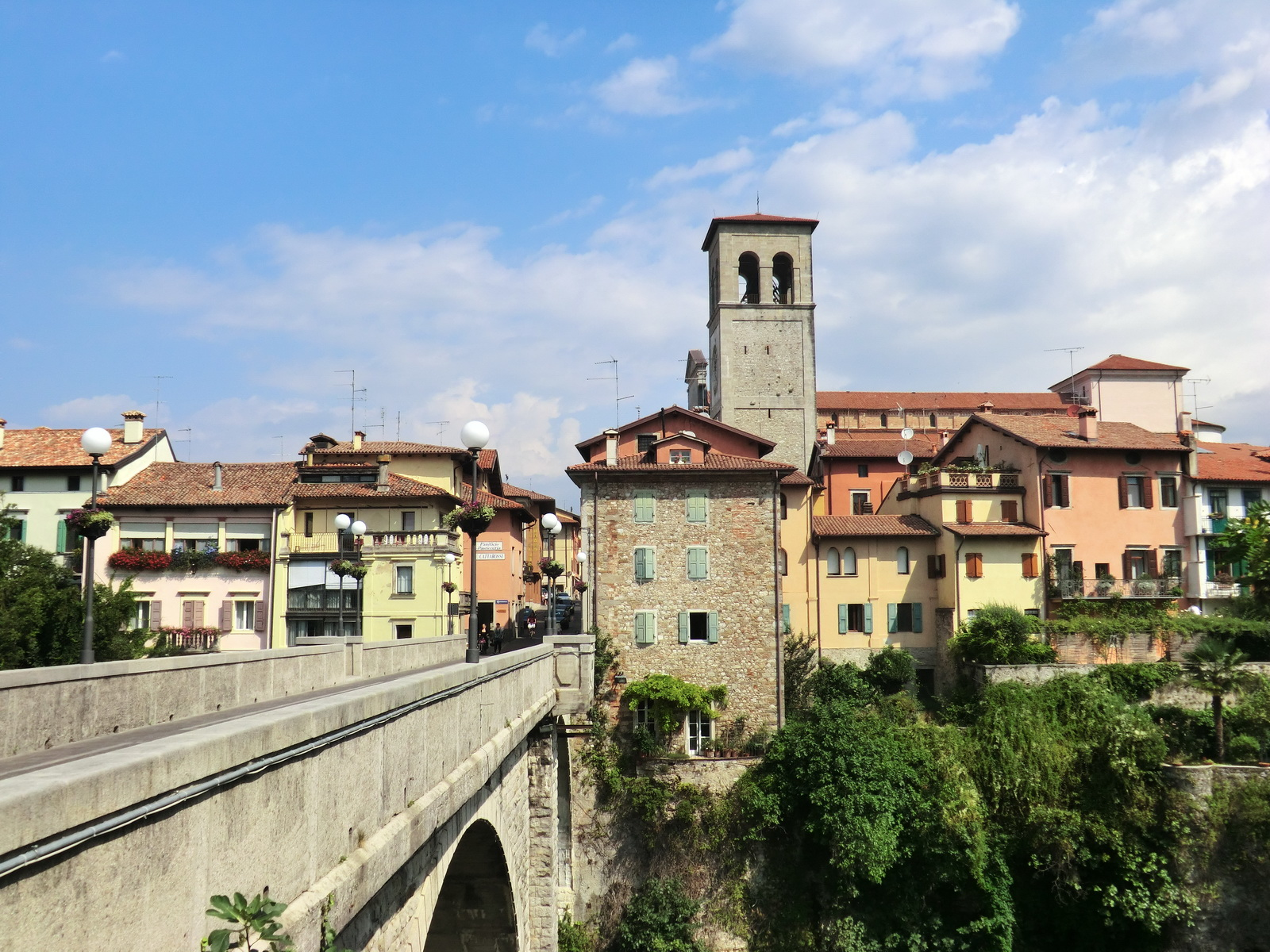 Cividale del Friuli, Friuli-Venezia Giulia, Italy